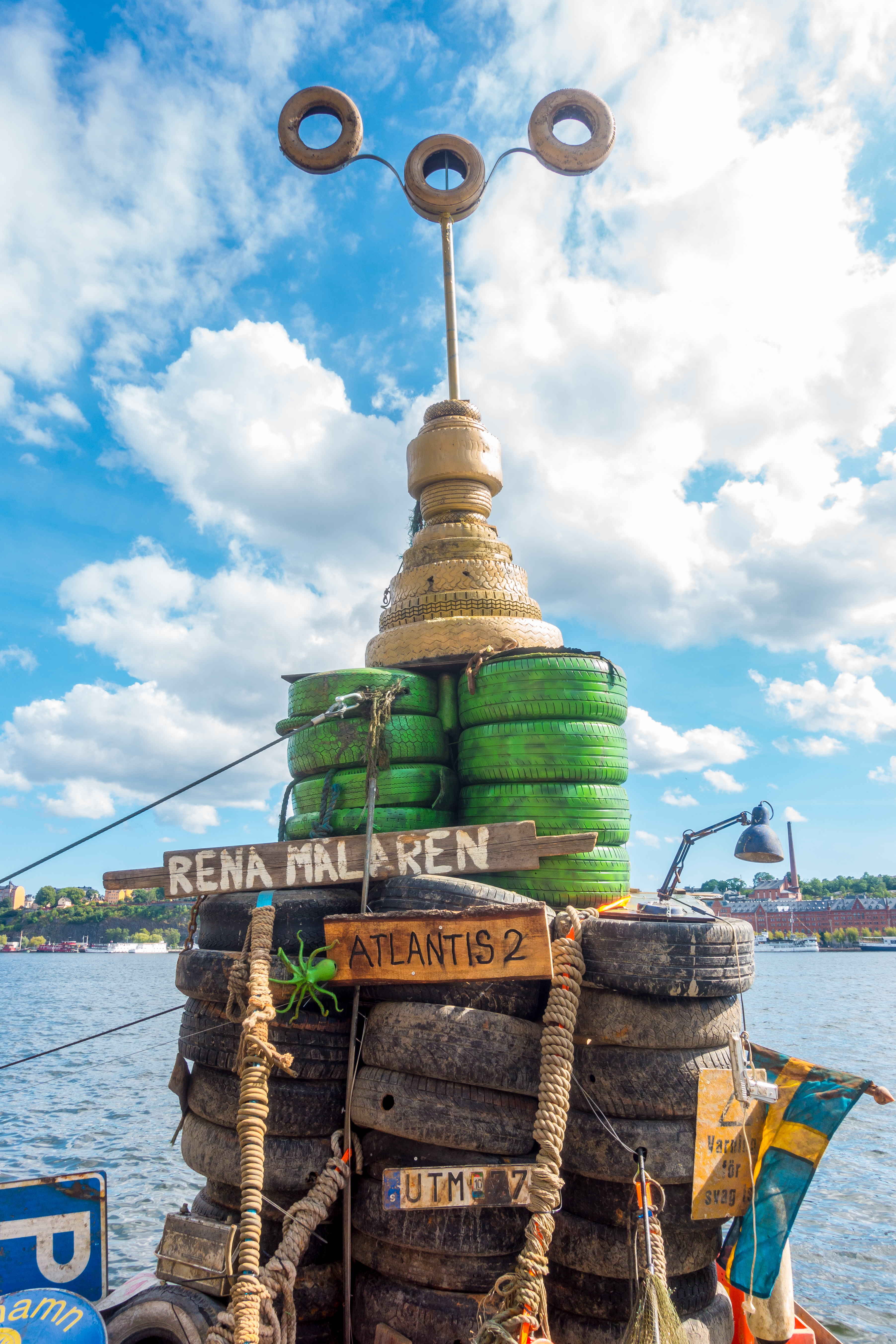 Konstverket "Atlantis 2" byggdes av frivilligorganisationen Rena Mälaren som rensat Söder Mälarstrand och Norr Mälarstrand från tonvis med bildäck, cyklar och bilbatterier som dumpats i Riddarfjärden i Stockholm genom åren. (18 juli 2020)